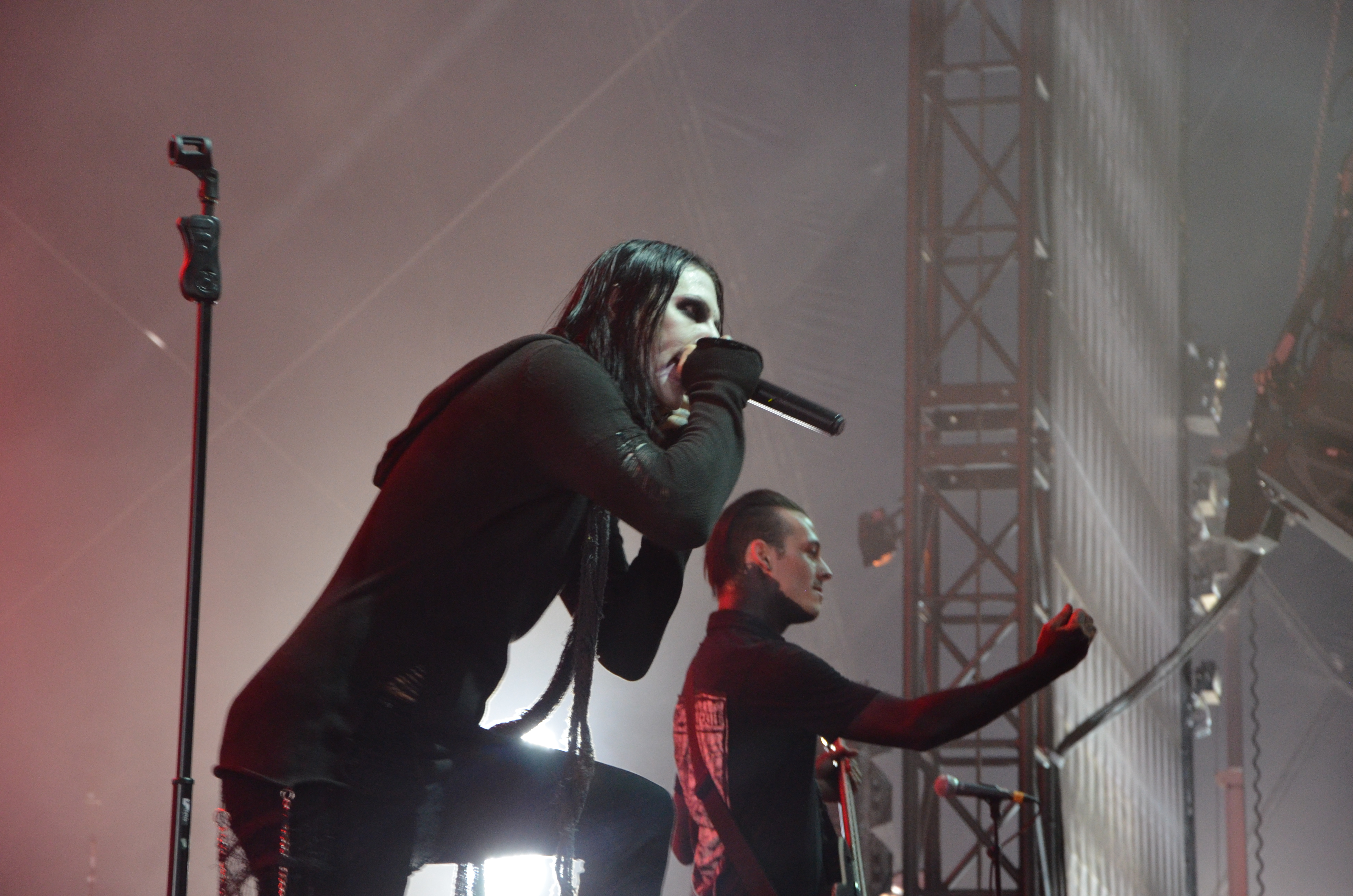 Motionless in White (vorne: Sänger Chris Motionless, hinten: Ryan Sitkowski) im Alternatent bei Rock am Ring 2015 in Mendig.